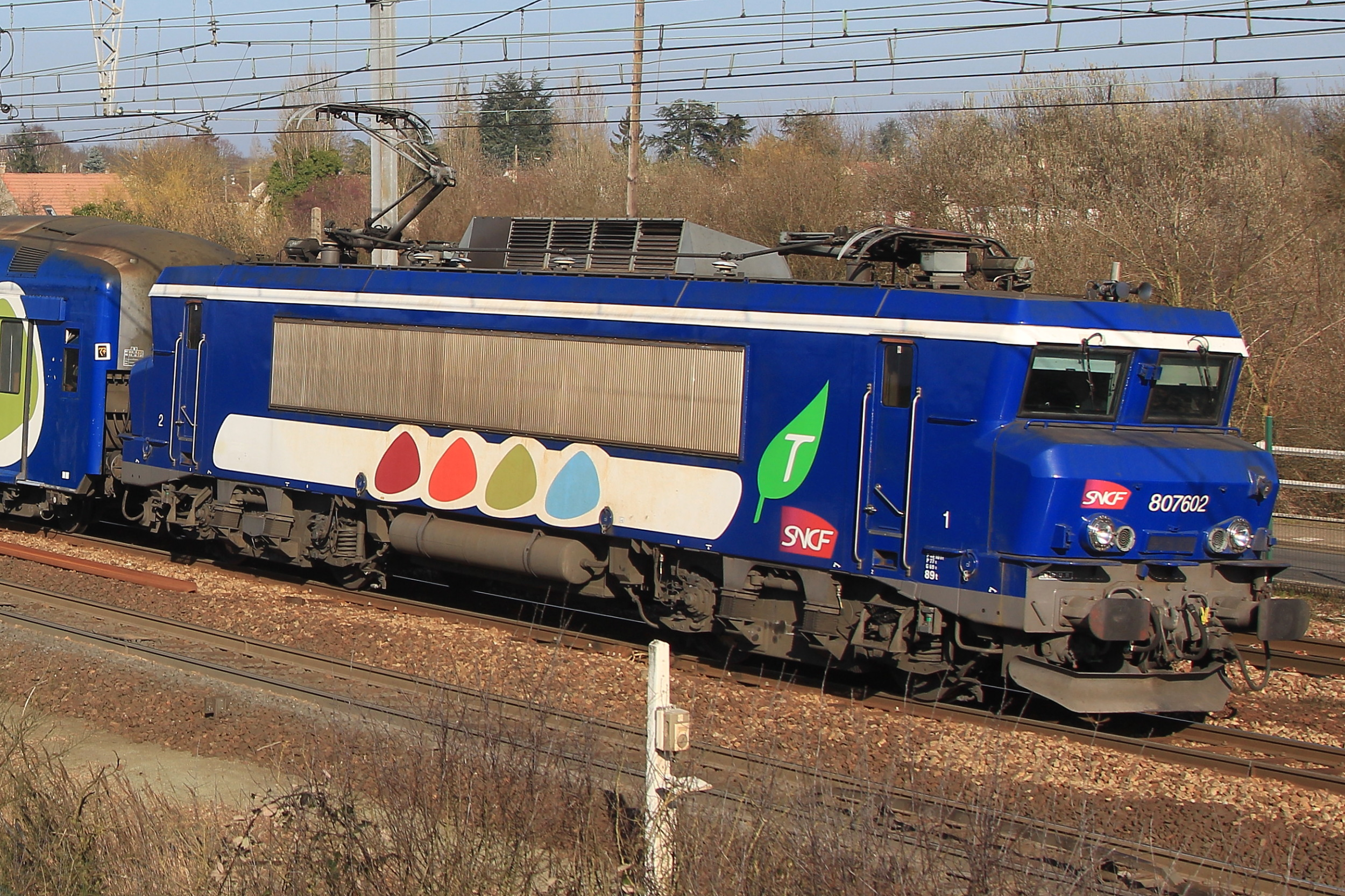 Vue en gros plan de la BB 7602.